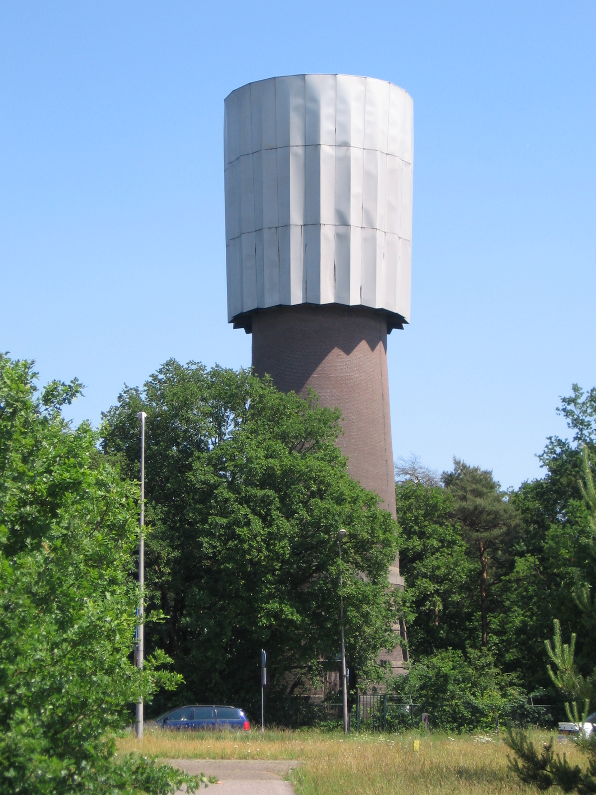 Bussum, watertoren, juni 2006